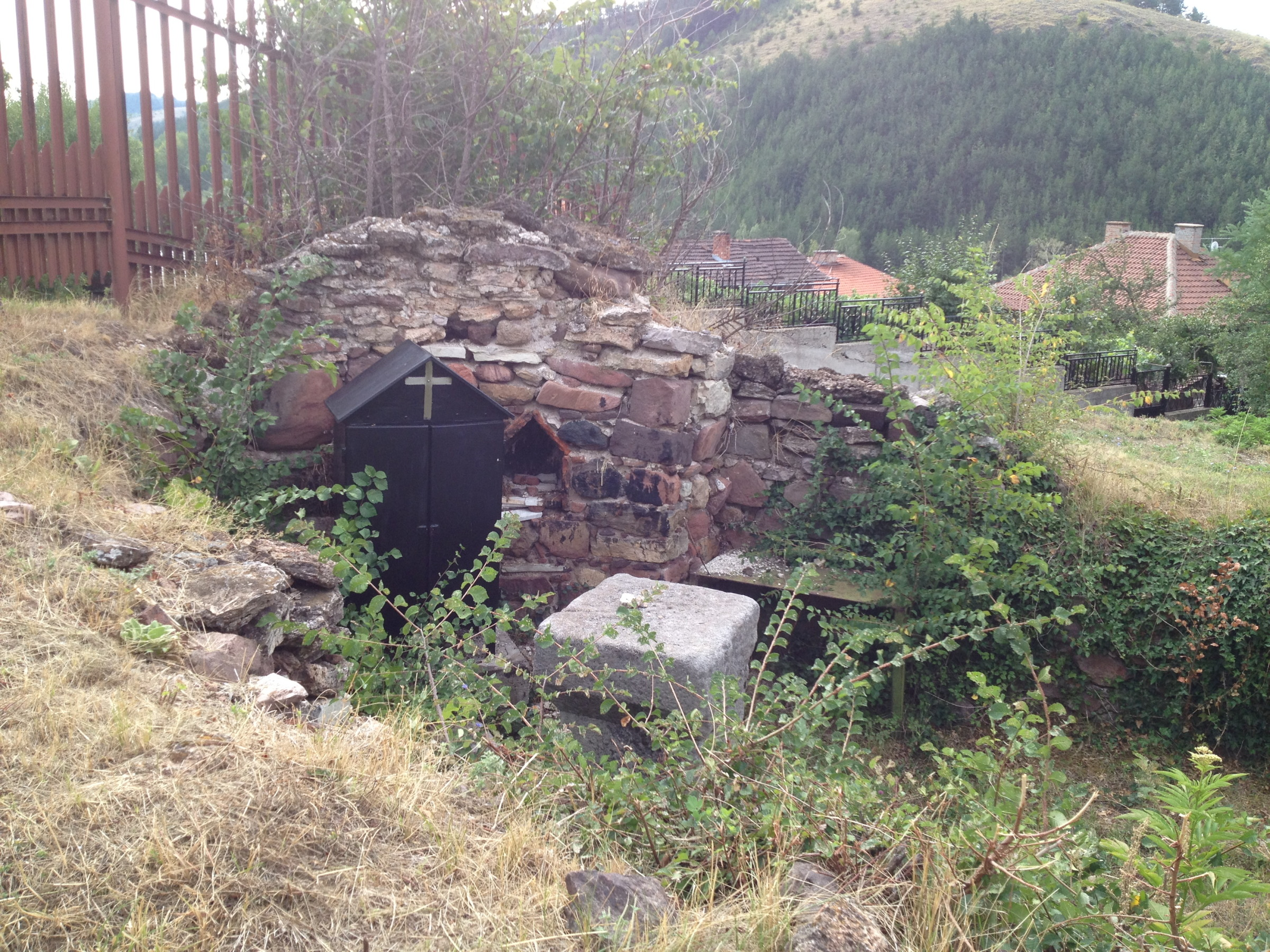 абсидата на късносредновевната църква "Св. Георги" в кв. Сеславци, Софийско.